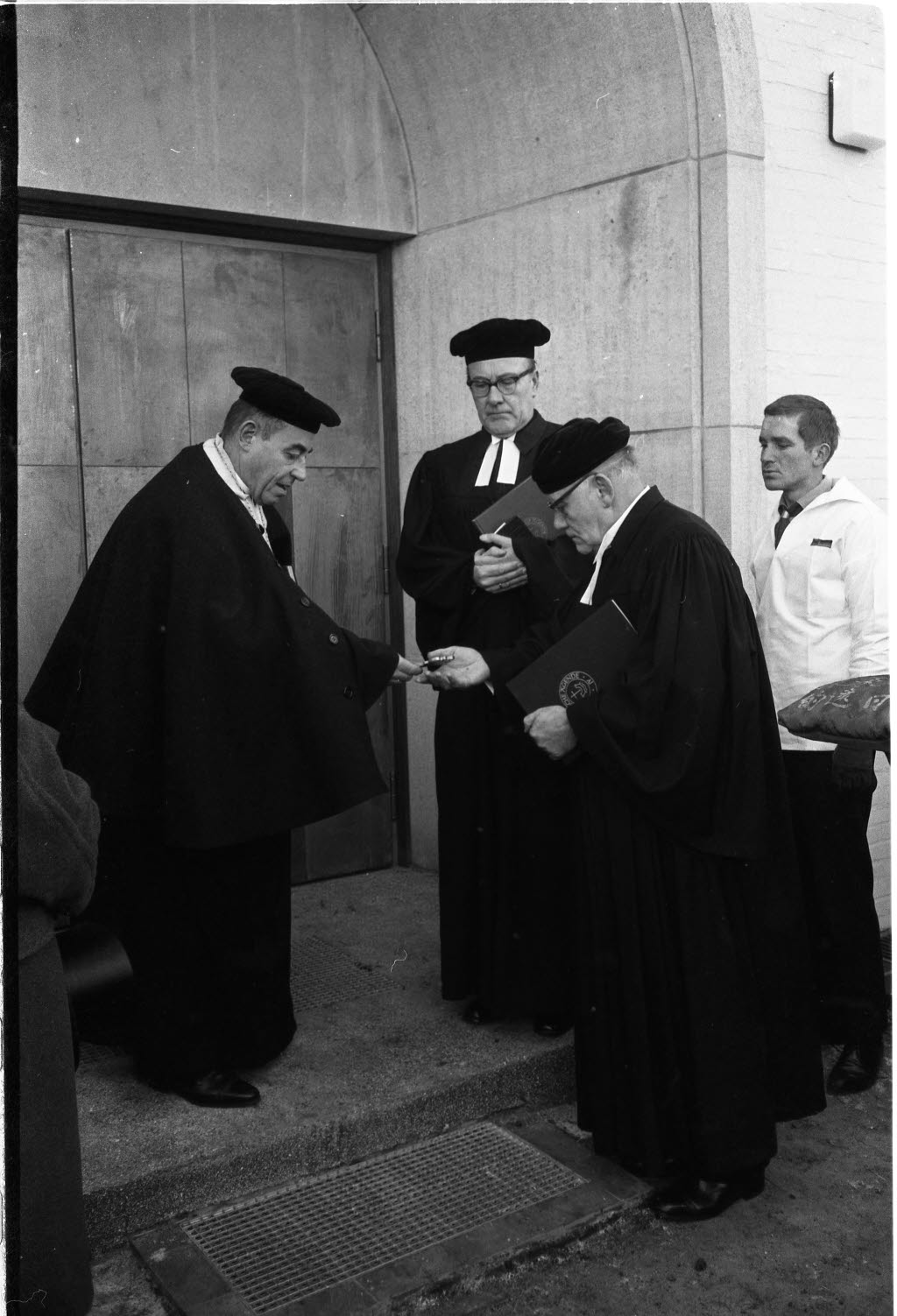 Einweihung. Schüsselübergabe durch Bischof von Holstein Wilhelm Halfmann (1.v.l.) an Pastor Theodor Pinn (3.v.l.).